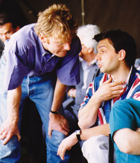 Fodor Gábor és Orbán Viktor a tanácskozás közben beszélgetnek - Szárszói Találkozó 1993